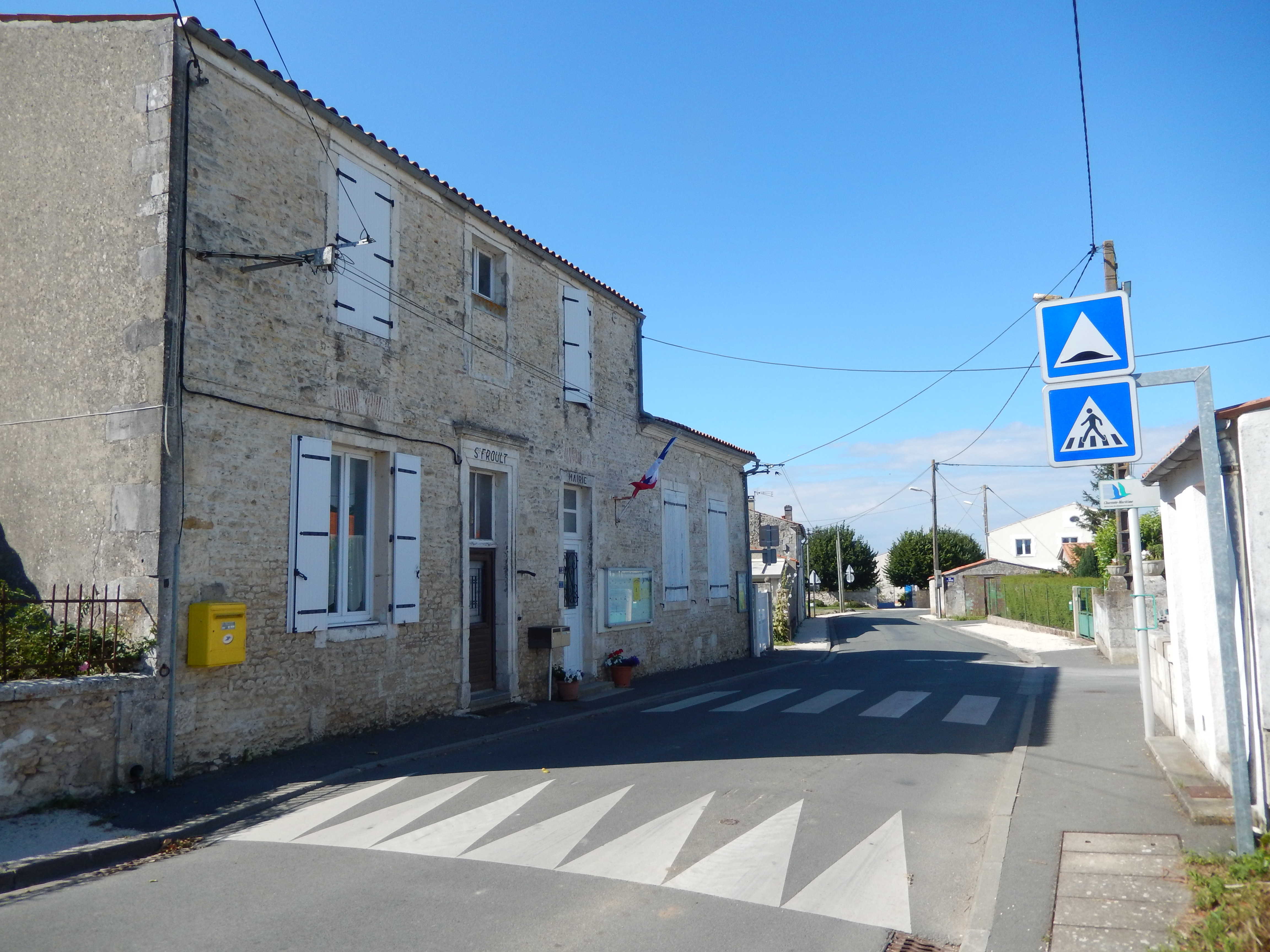 Saint-Froult, Charente-Maritime, France. • La rue de l'Europe, ici photographiée en direction du nord et de Saint-Nazaire-sur-Charente, est la rue principale de Saint-Froult. Elle fait partie de la route départementale D125E1. La mairie de la commune, visible sur la gauche de l'image, y est implantée. On aperçoit également, sur la droite de l'image, un arrêt de bus du réseau départemental. Enfin, un plateau ralentisseur et une zone 30 y ont été installés.